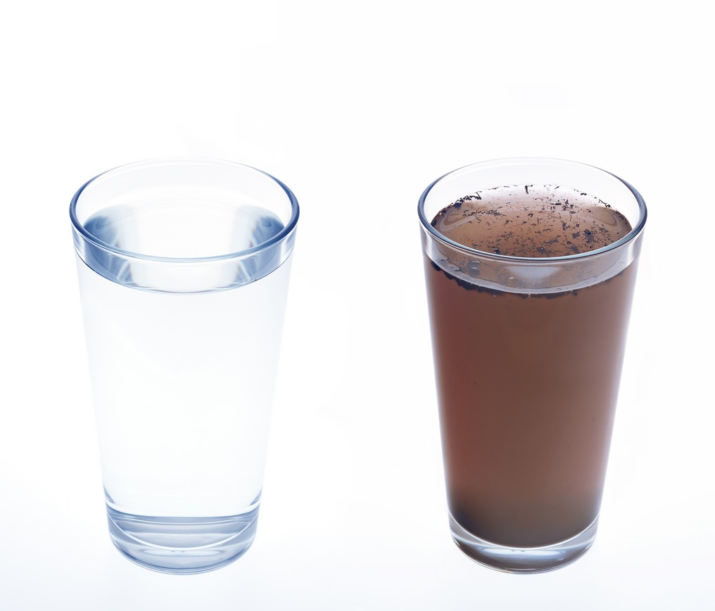 کاربرد نانو مواد در تصفیه آب